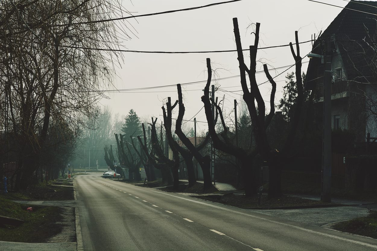 Tarcsai út Rákoscsaba-Újtelepen.